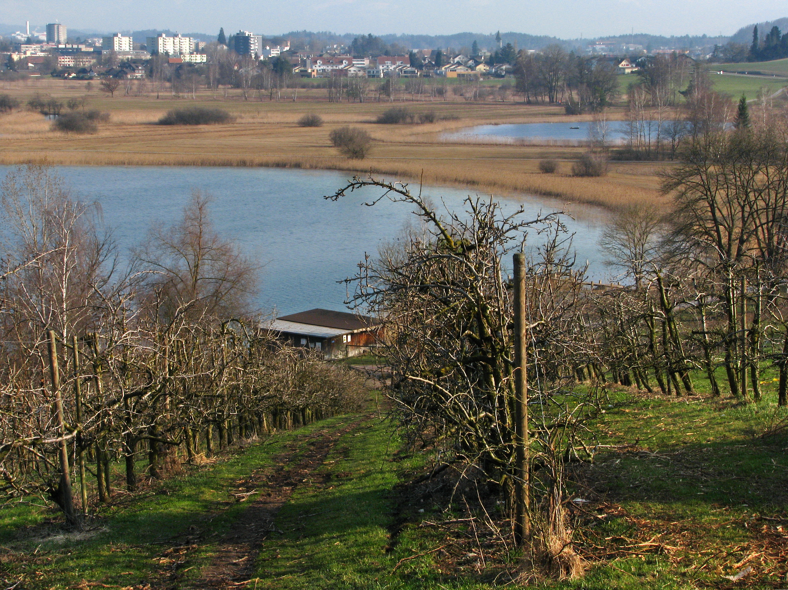 Pfäffikersee (Lake Pfäffikon) and Robenhuserriet, as seen from Seegräben, Aabach to the left, Wetzikon in the background.